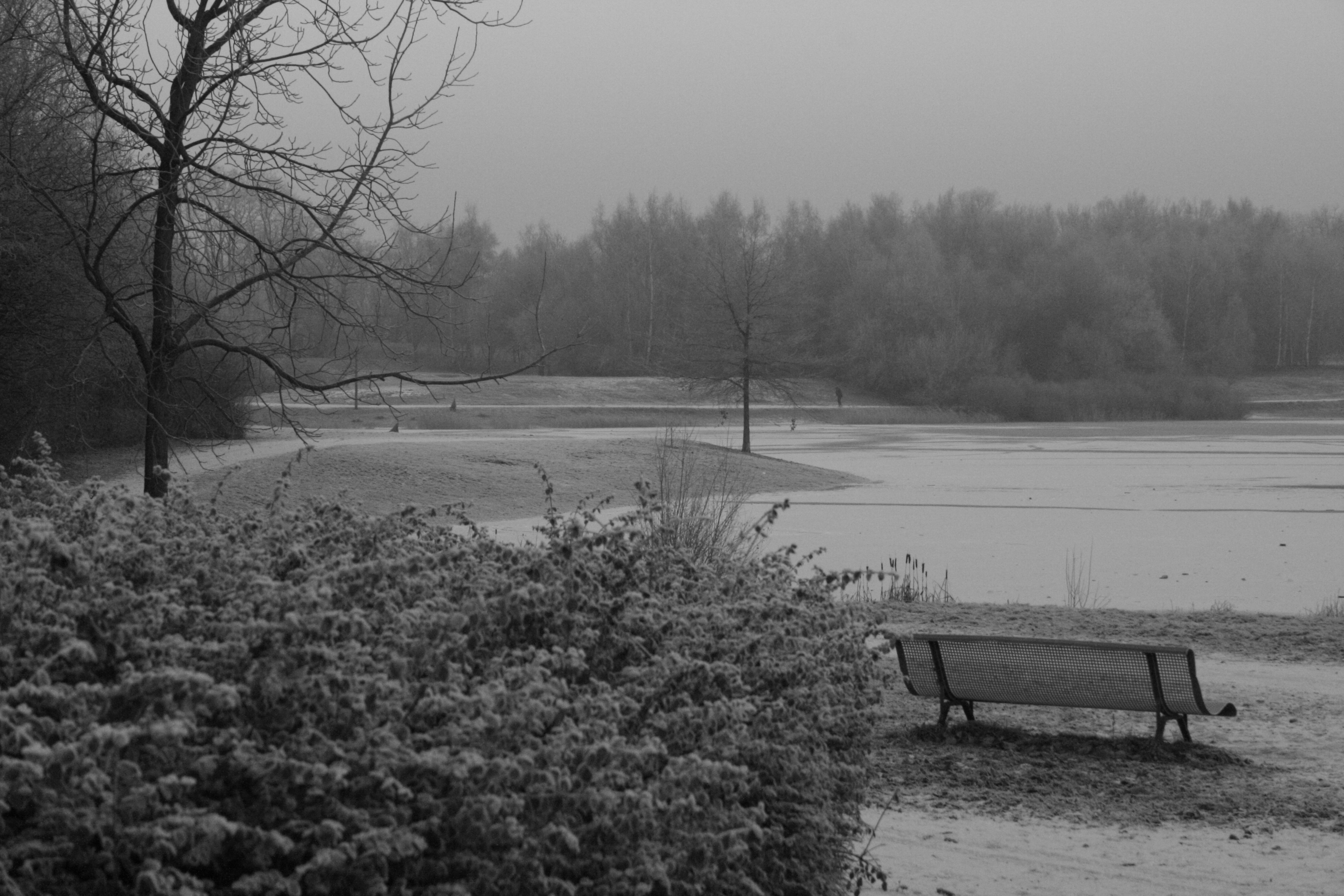 L'Etang de la Briquette en Hiver